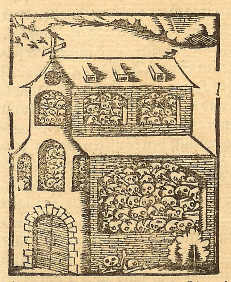 Abbildung des Beinhauses zu Murten in der Cosmographia von Sebastian Münster